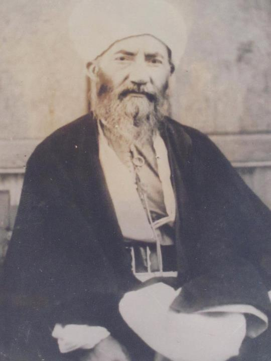 Sheikh Ala’ al-Din al-Naqshbandi